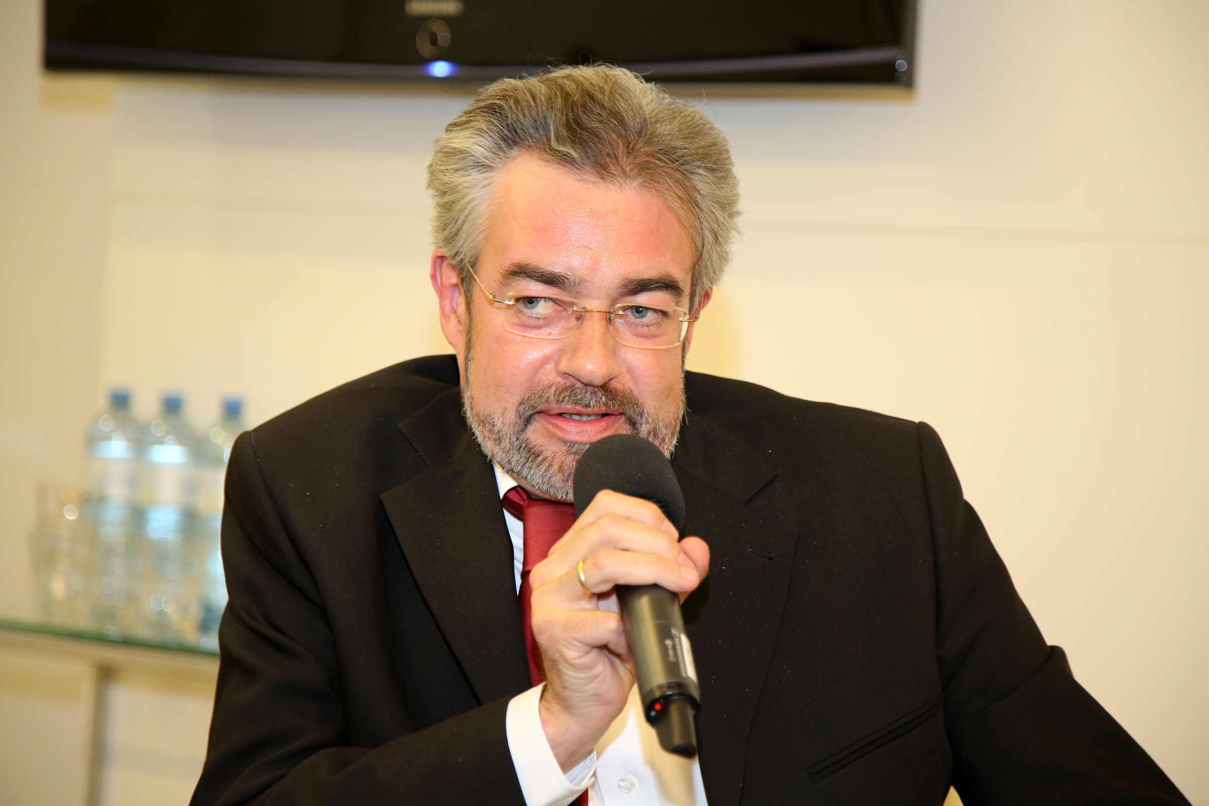 Maurer.Herbert-6740